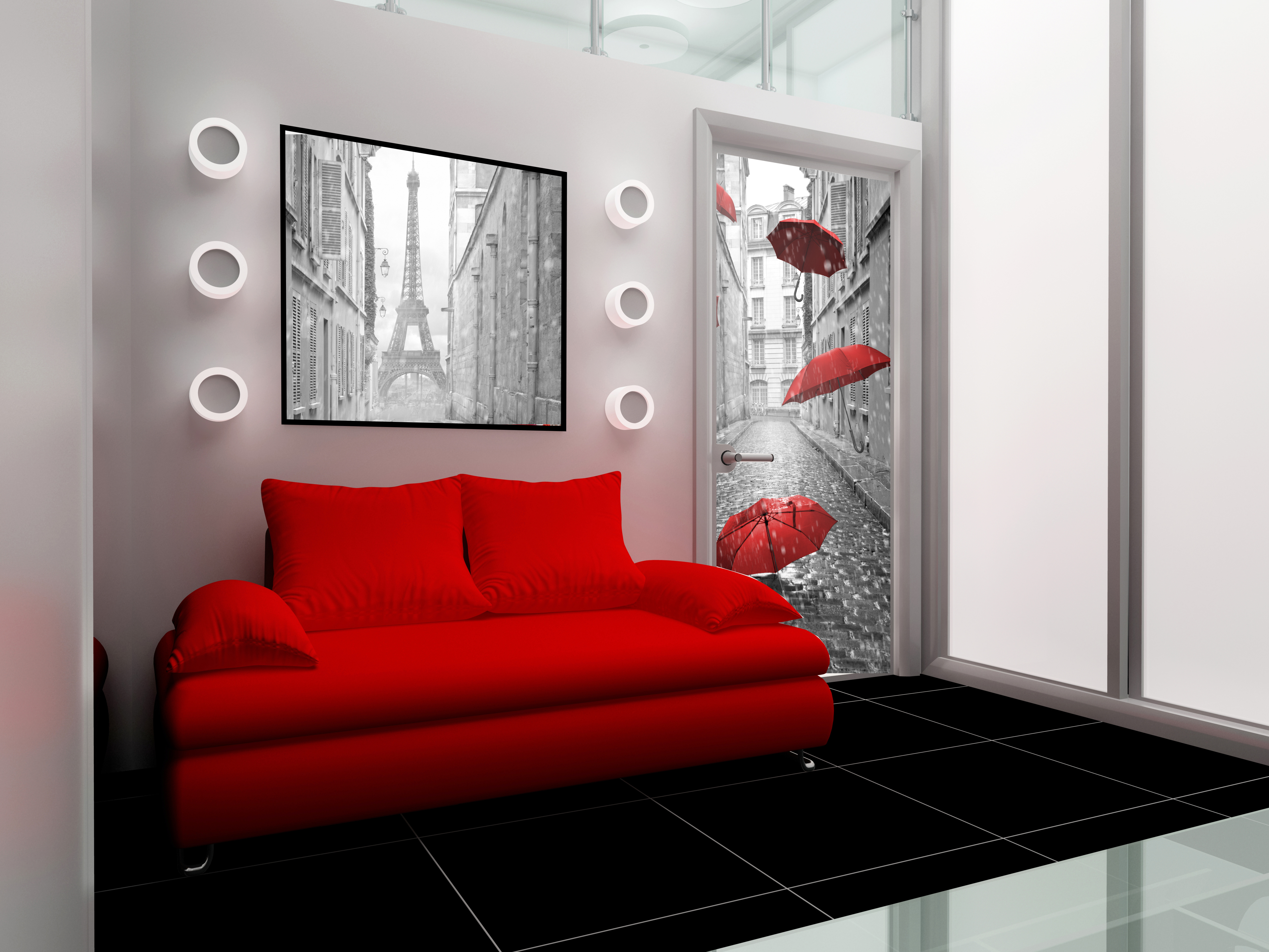 Projekt z wykorzystaniem szkła laminowanego z grafika opus glass w obrazach i jako front drzwi.